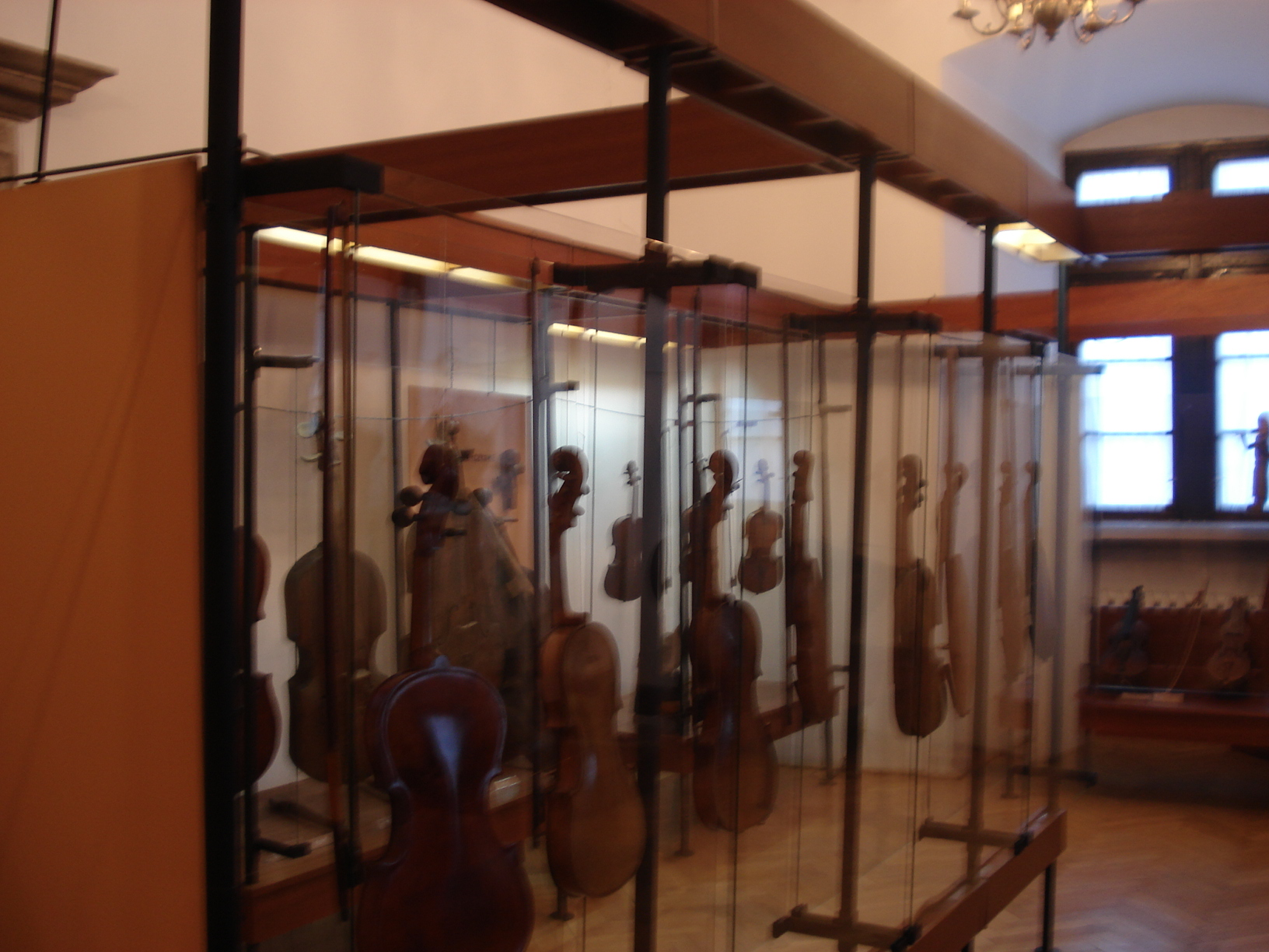 Fragment ekspozycji stałej w Muzeum Ludowych Instrumentów Muzycznych w Szydłowcu